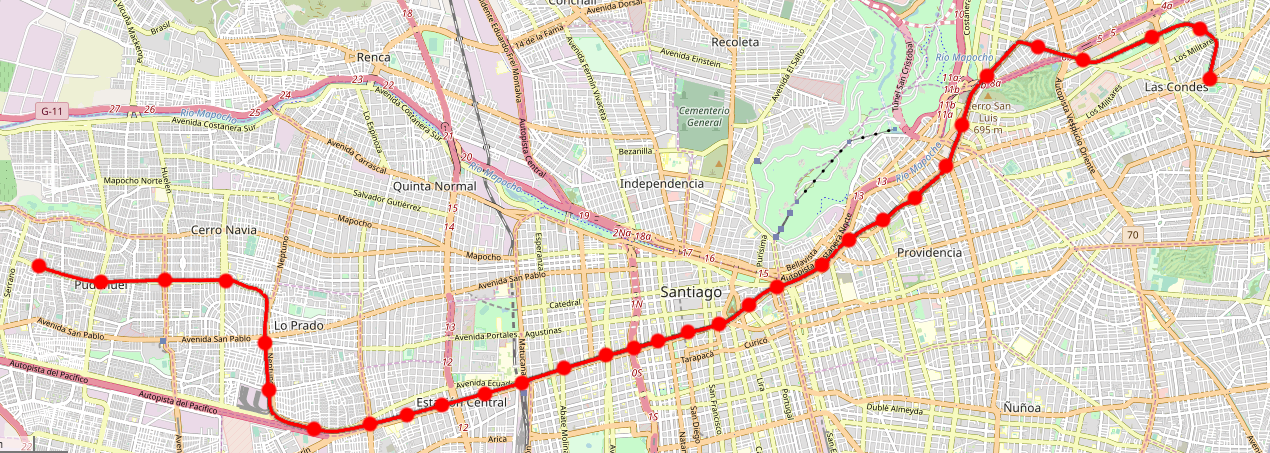 Plano del trazado del proyecto original de la Línea 1 del Metro de Santiago, de acuerdo al proyecto BCEOM-SOFRETU-CADE de 1968.